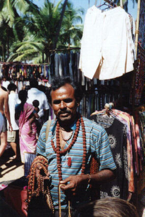 Händler auf dem Flohmarkt nahe Anjuna Beach (Eigene Aufnahme, 1998, GNU-FDL)